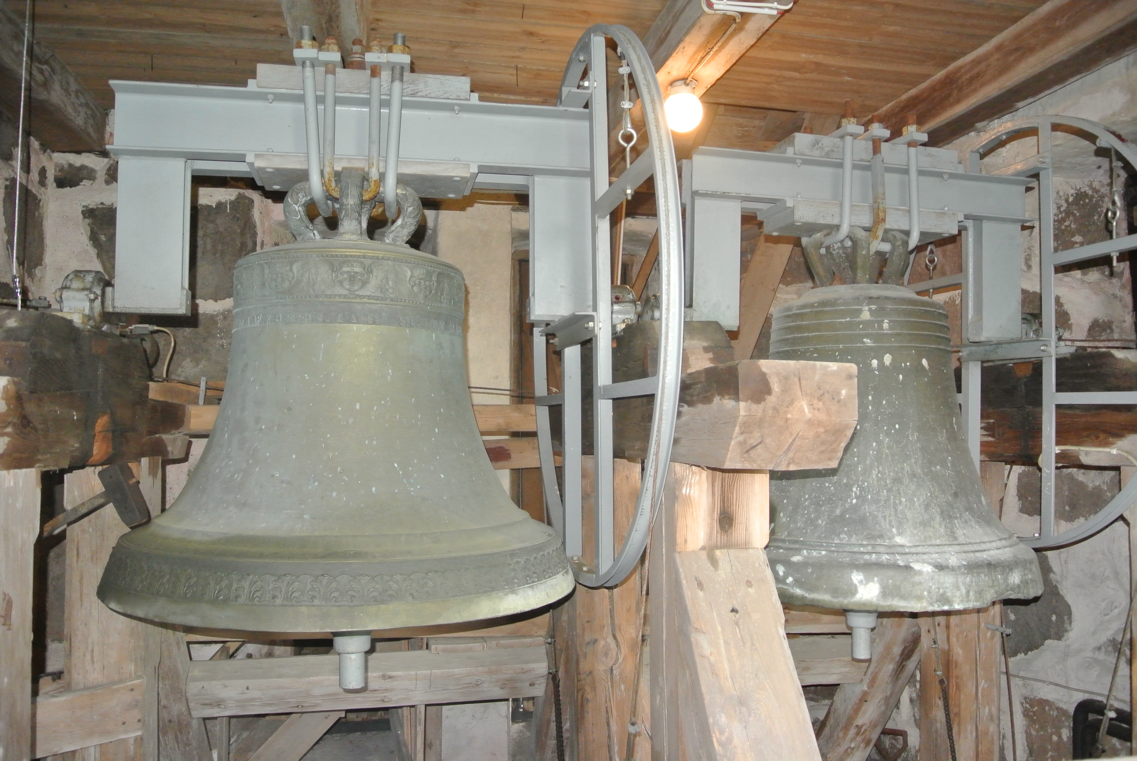 Röke kyrkas 2 klockor. Storklockan till vänster är exakt likadan som storklockan i Västra Torup, och gjöts av samme gjutare och årtal, dvs. Bergholtz år 1910. Lillklockan till höger är från 1400 talet och saknar helt inskrift